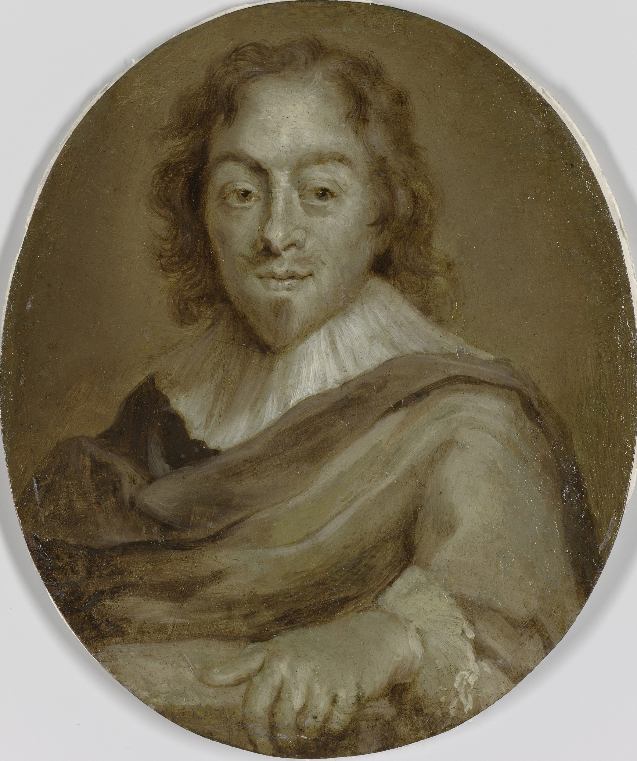 Portret van Constantijn Huygens (1596-1687). Dichter, secretaris van prins Frederik Hendrik en prins Willem II en eerste raad en rekenmeester van prins Willem III. Buste in ovaal, aanziend. Onderdeel van een verzameling portretten van Nederlandse dichters. Collection: schilderijen; Panpoeticon Batavum